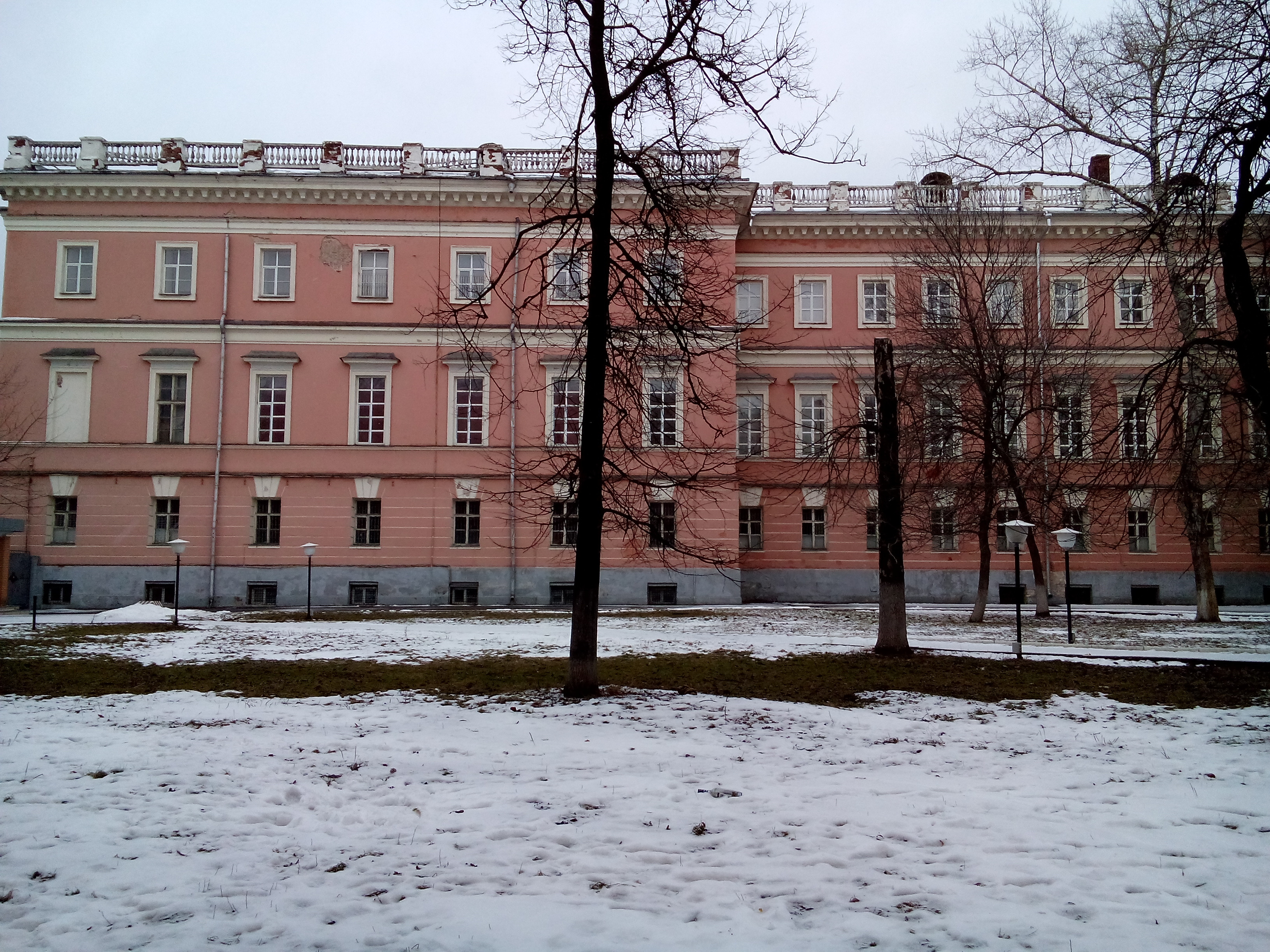 Москва